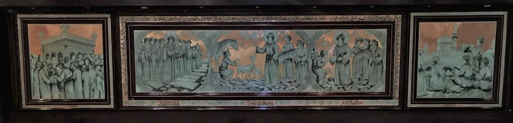 ورود امام رضا به خراسان اثر الیاسی